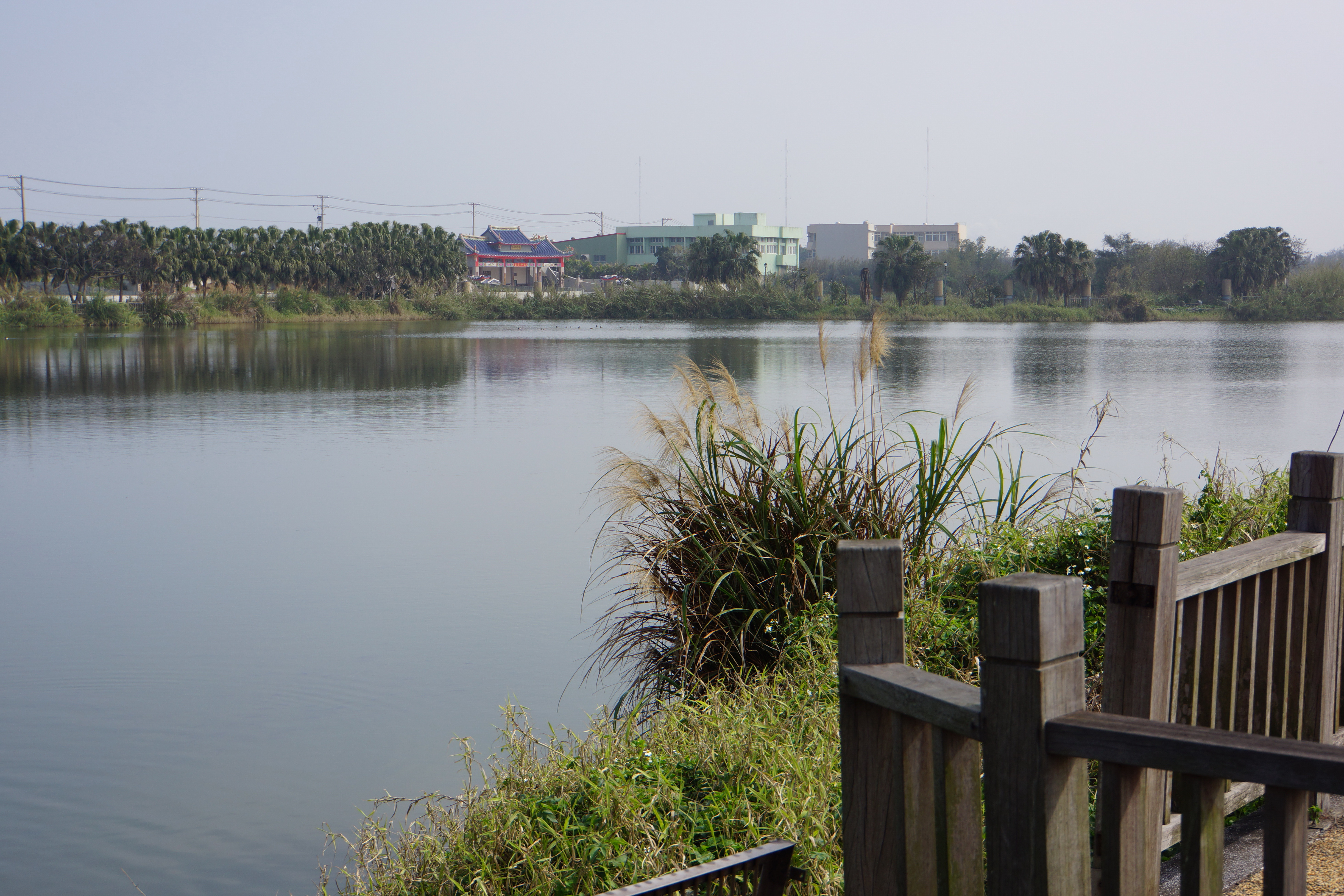 觀音埤 Guanyin Pond